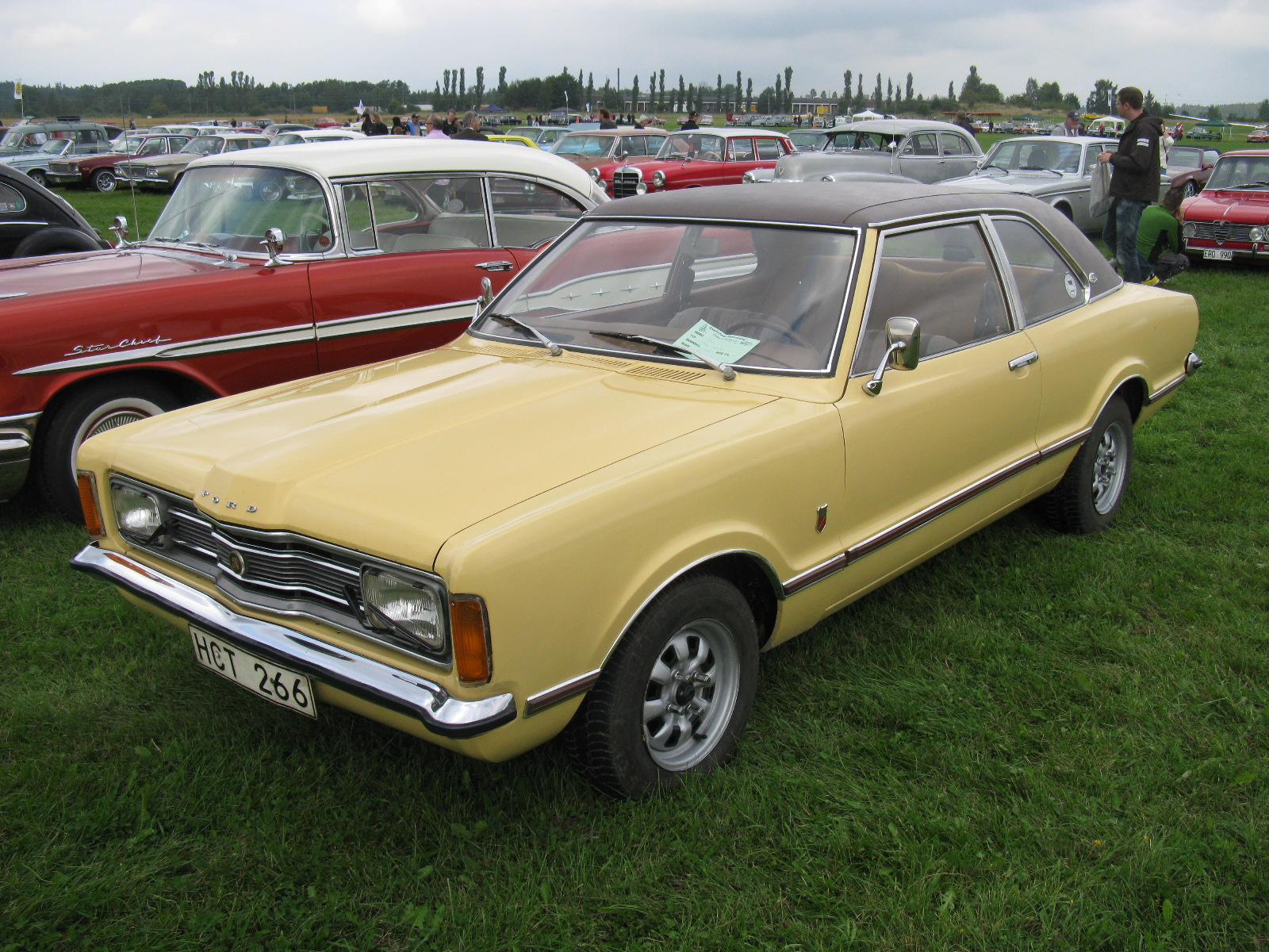 Ford Taunus 2000 GXL